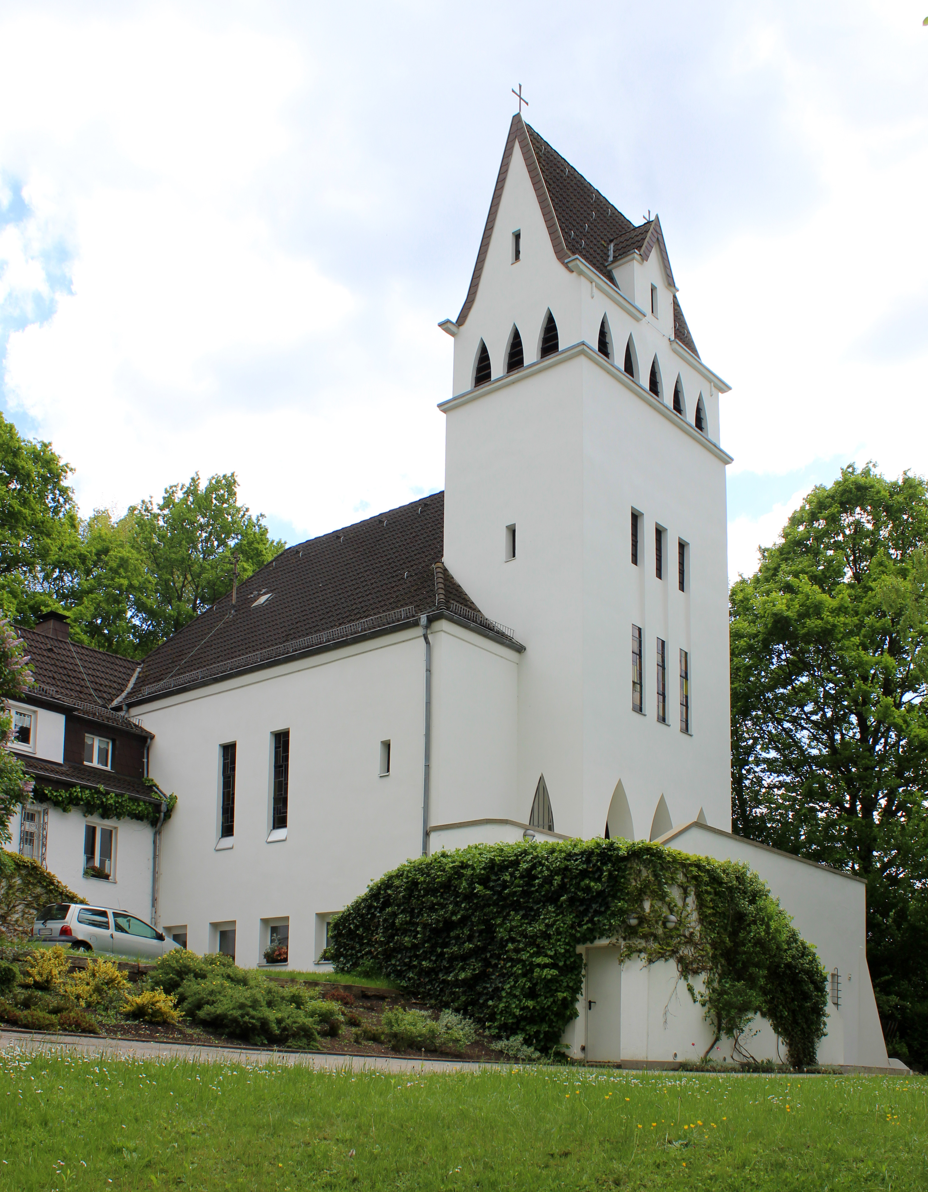 Evangelische Kirche in Fischbach-Camphausen, Gemeinde Quierschied, Regionalverband Saarbrücken, Saarland